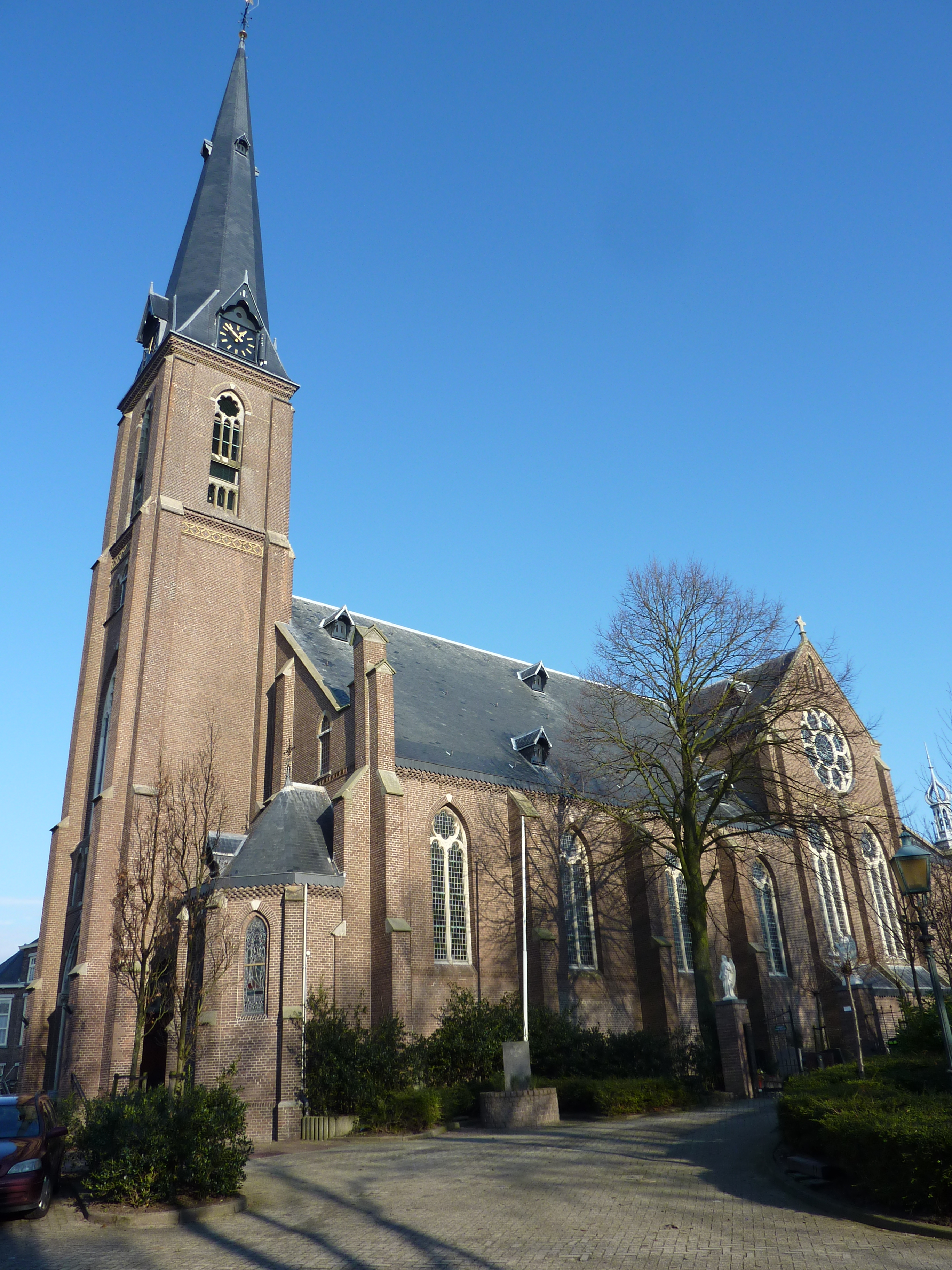 Voorhout, Bartholomeuskerk